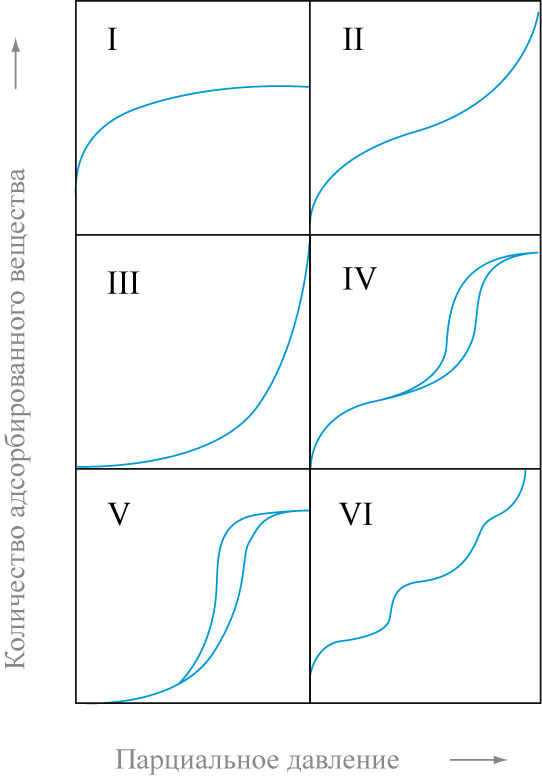 Типы изотерм адсорбции. // Types of adsorption isotherms.